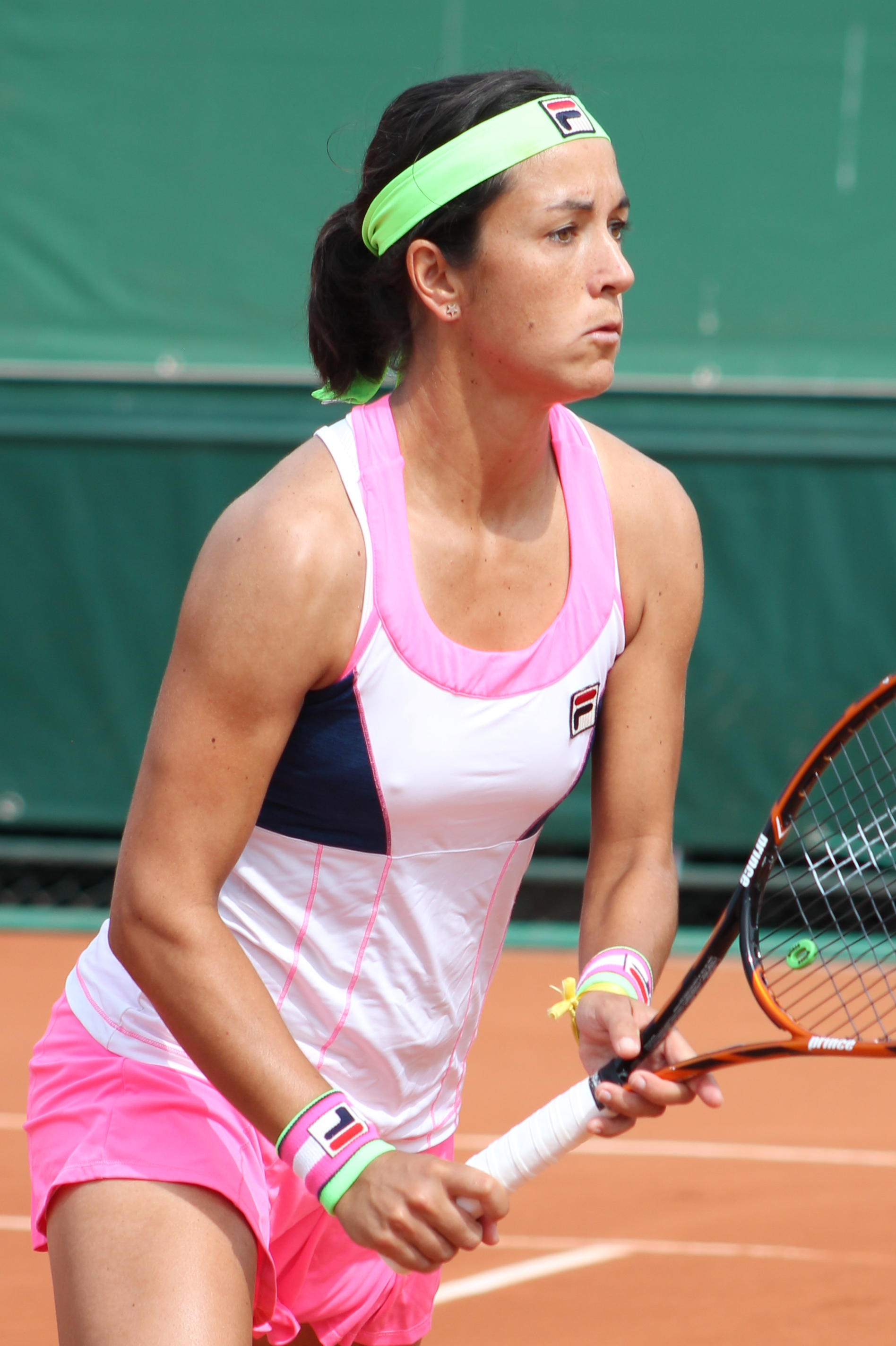 Soler Espinosa RG15 (3)